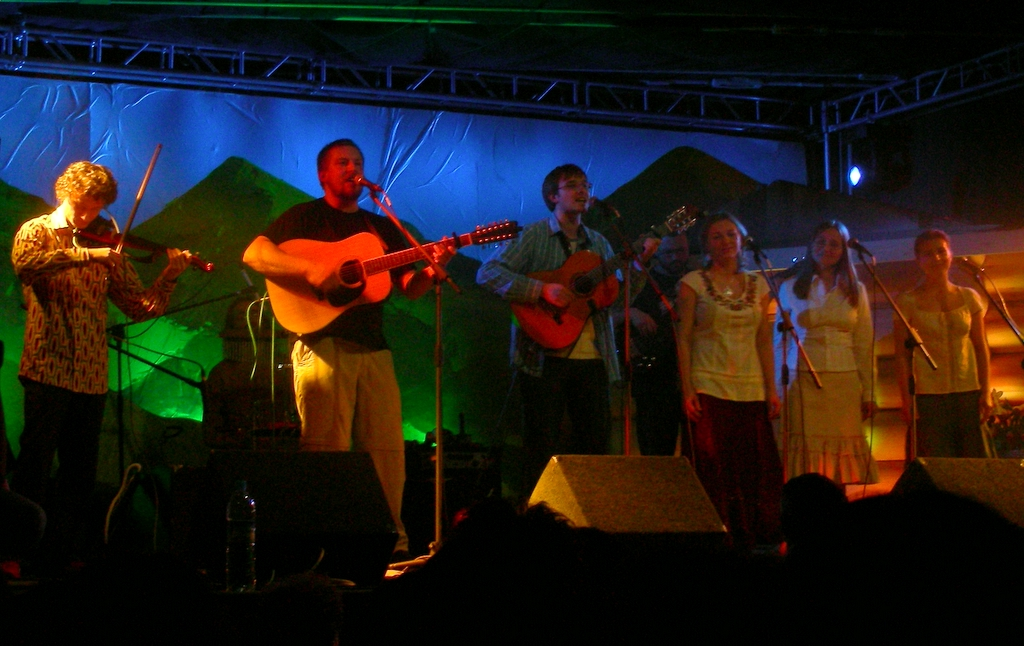 Dom o Zielonych Progach, koncert podczas festiwalu YAPA 2007